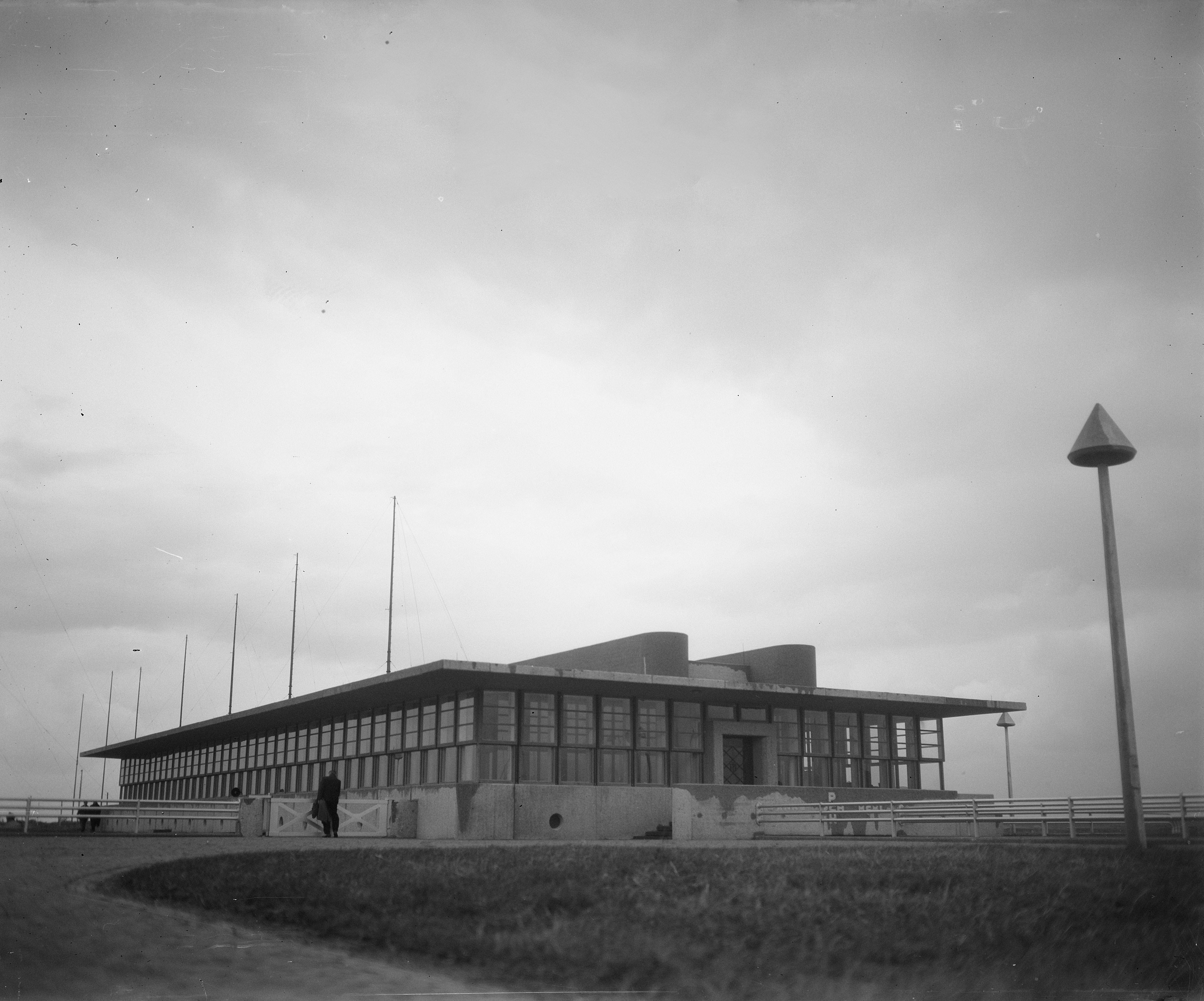 Collectie / Archief : Fotocollectie Anefo Reportage / Serie : [ onbekend ] Beschrijving : Nieuw station van Scheveningen Radio te IJmuiden Datum : 21 november 1951 Locatie : IJmuiden Trefwoorden : gebouwen, radiozenders Instellingsnaam : Scheveningen Radio Fotograaf : Duinen, […] van / Anefo Auteursrechthebbende : Nationaal Archief Materiaalsoort : Glasnegatief Nummer archiefinventaris : bekijk toegang 2.24.01.09 Bestanddeelnummer : 904-8574